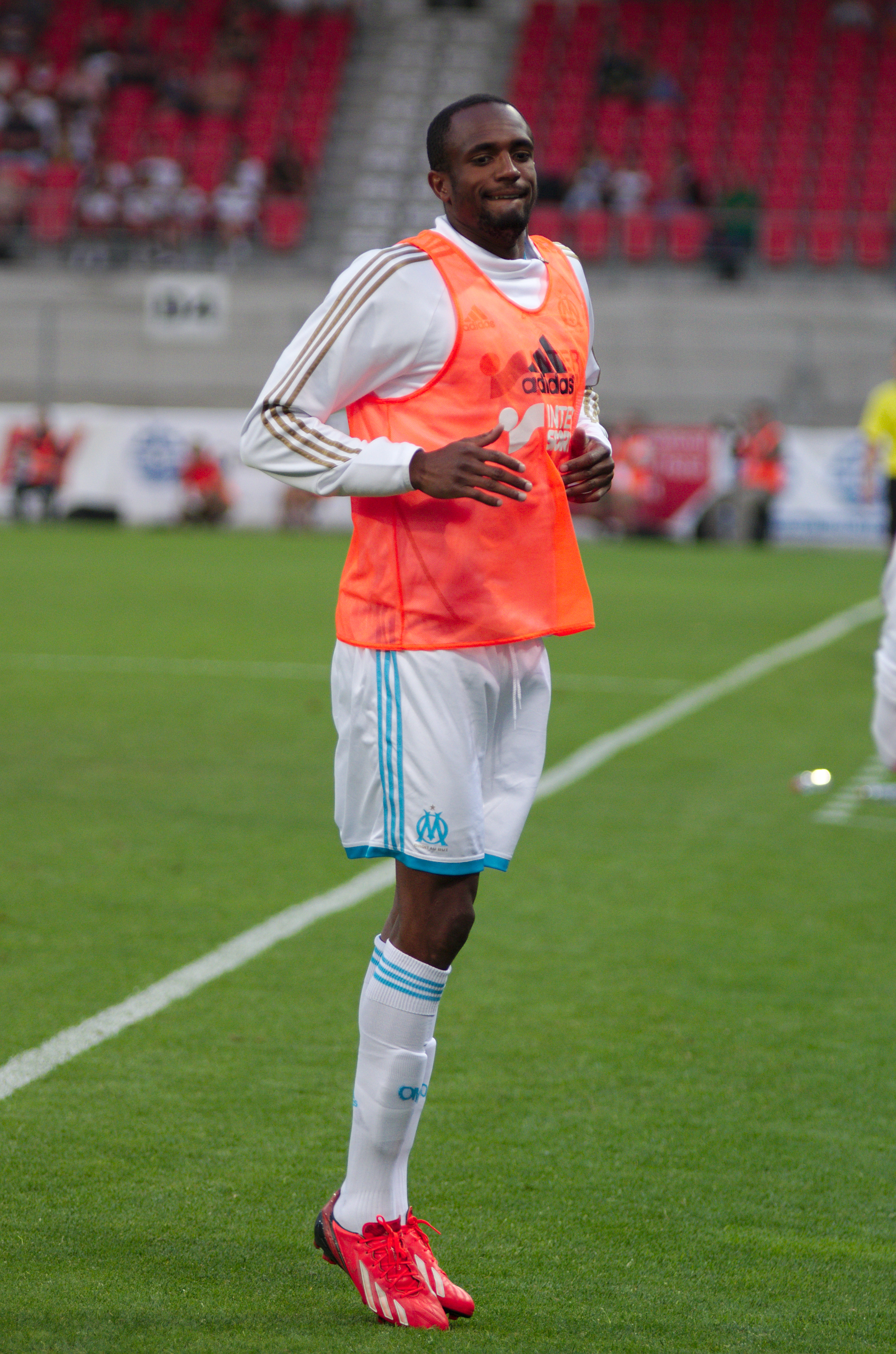 Valais Cup 2013 - OM-FC Porto - 20130713 - Kassim Abdallah